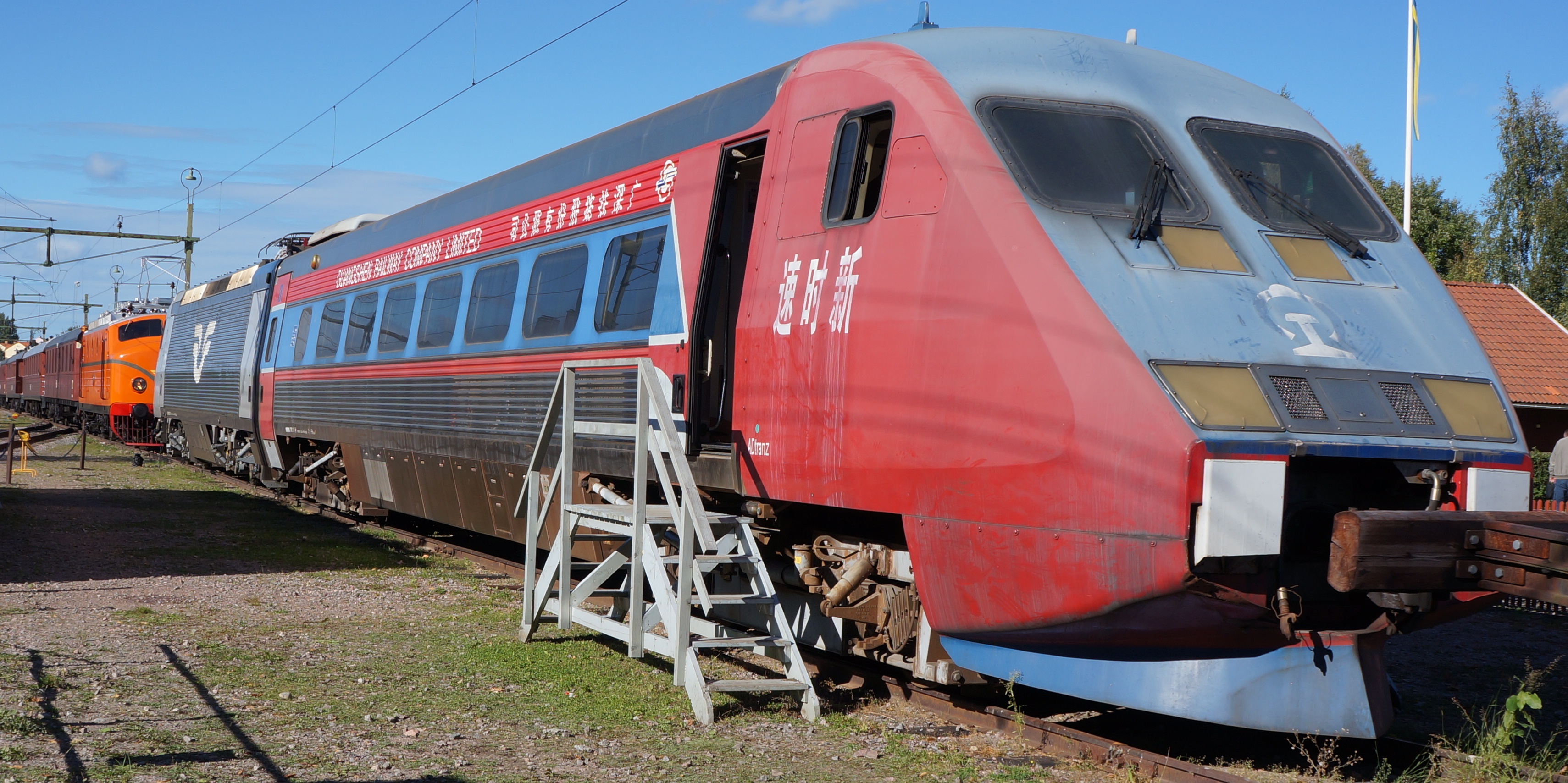 Manövervagnen UB2X i den kinesiska varianten av ASEA:s X2. (X2000). Här på plats på järnvägsmuséet i Gävle 2012.